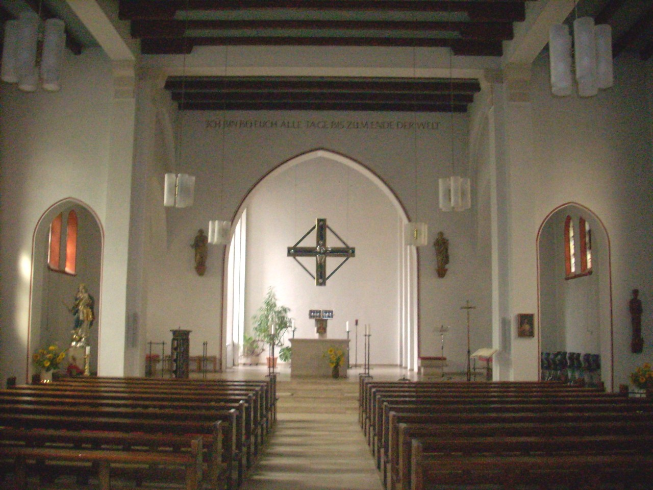 Lehrte, Kath. Kirche St. Bernward, Inneres